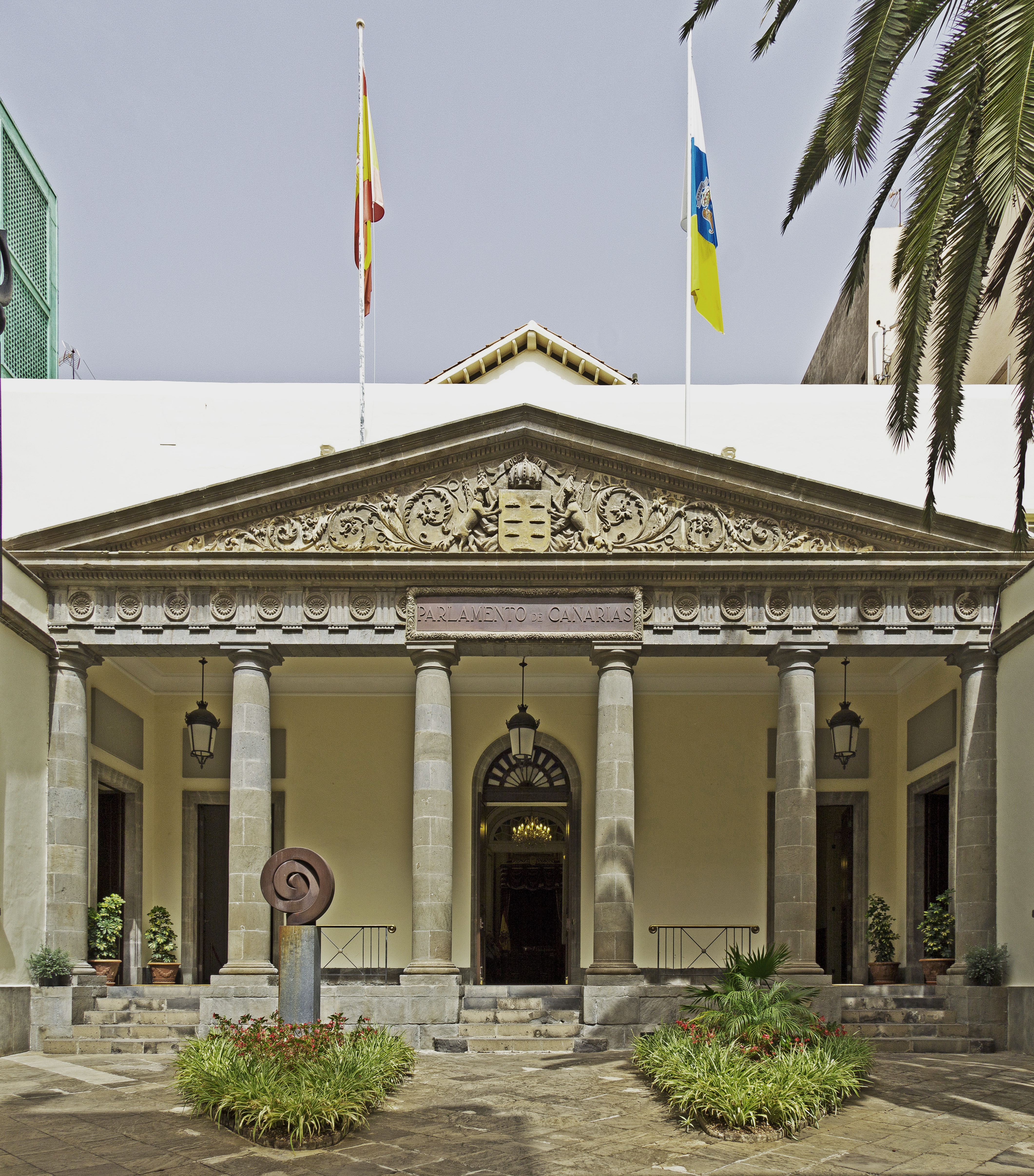 Fassade des Plenarsaals des Parlaments der Kanarischen Inseln (Parlamento de la Comunidad autónoma de Canarias) in Santa Cruz de Tenerife.